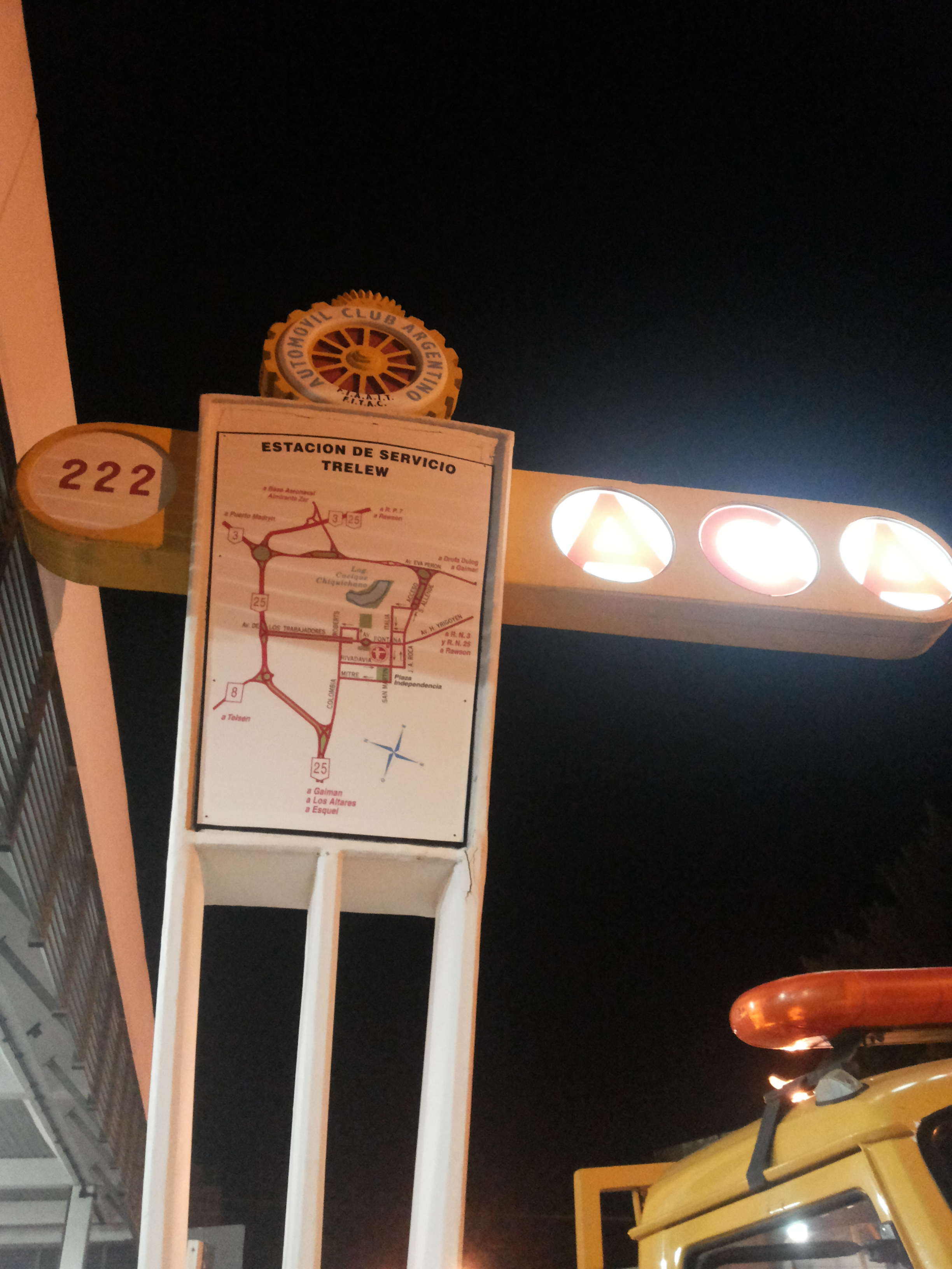 Cartel de la estación ACA Trelew de noche (2 de la mañana)